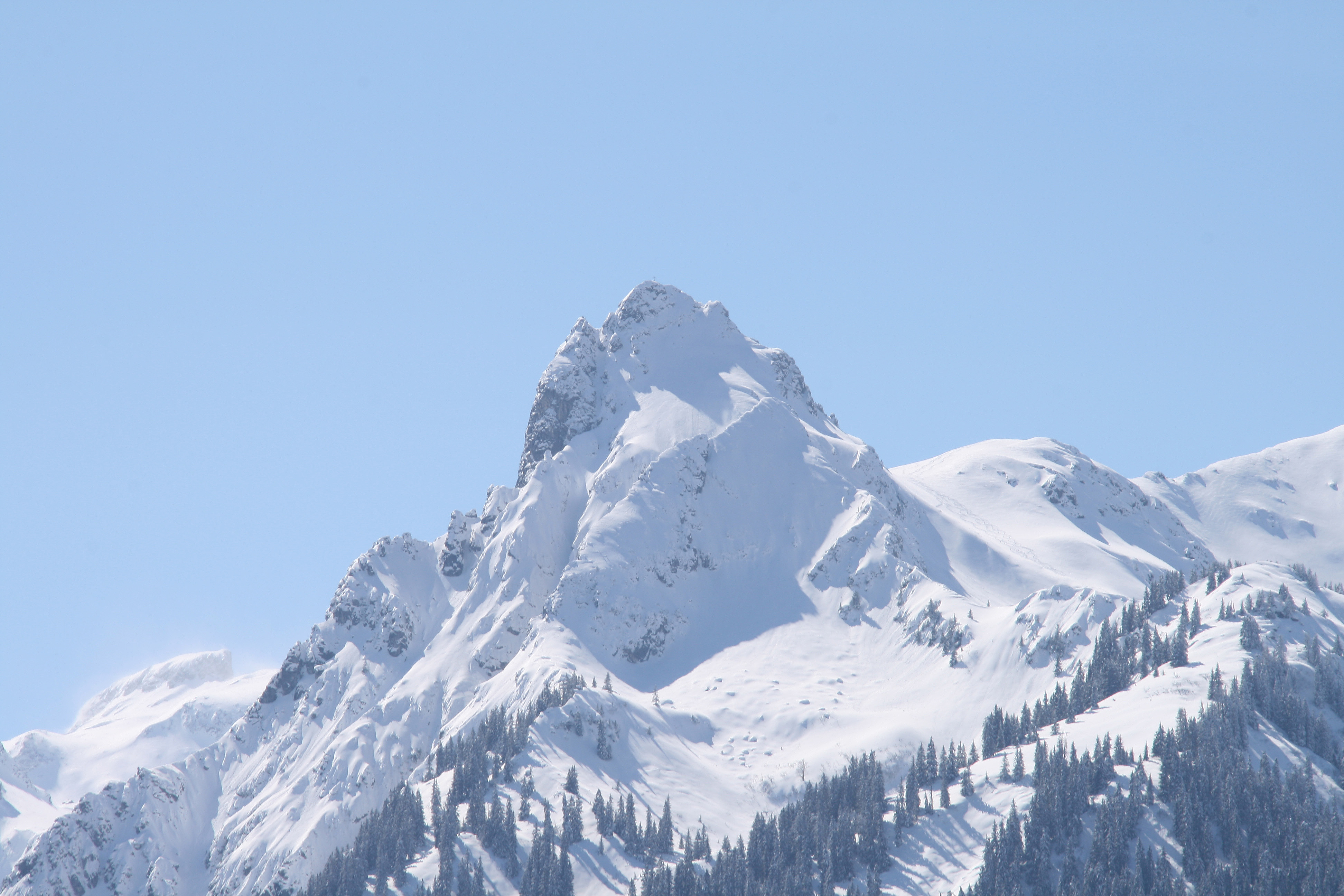 Blick vom Bergpanoramastandort neben der Kirche in Bartholomäberg auf die gegenüberliegenden Berge des Rätikon. Hier die Tschaggunser Mittagspitze mit 2168m.